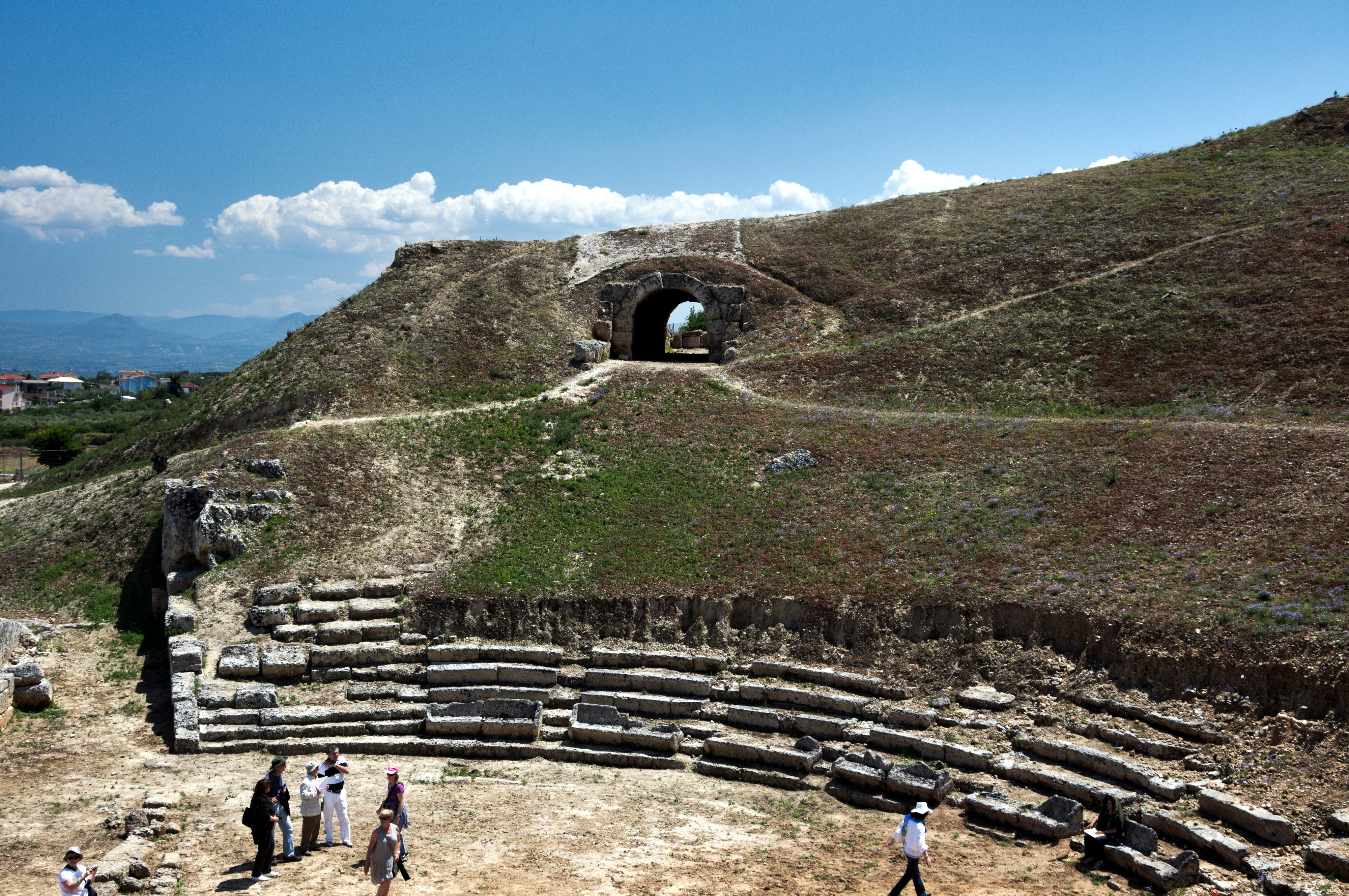 Θέατρο Σικυώνος, Νοτιοανατολική πλευρά και είσοδος«Θέατρο Σικυώνος»